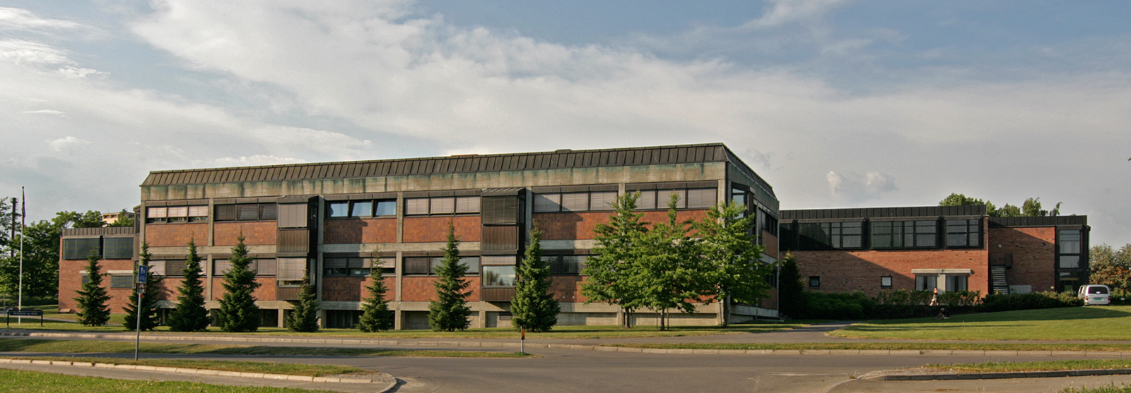 Storhamar videreående skole, Hamar.